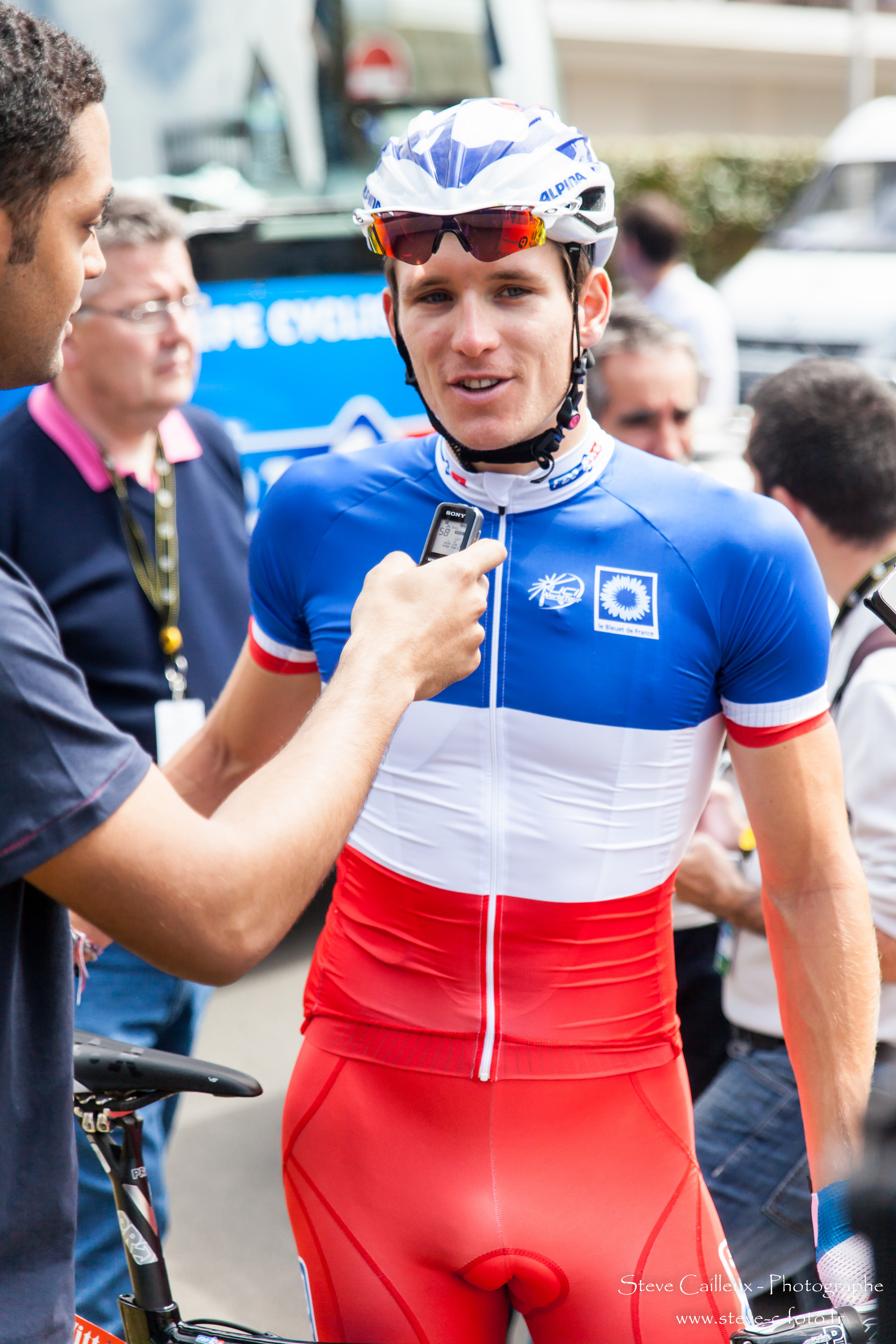 Anaud Demare-Steve.C